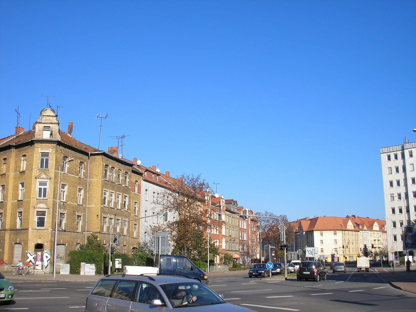 Der Steinplatz in Erfurt.